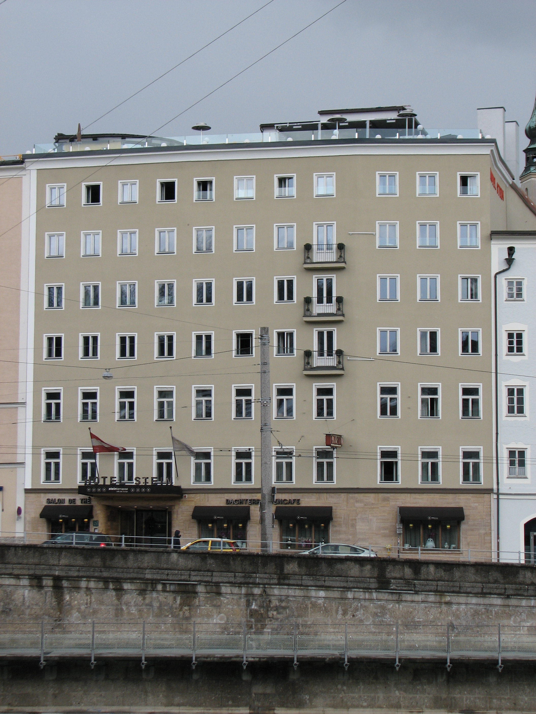 Bürgerhaus, Hotel Stein